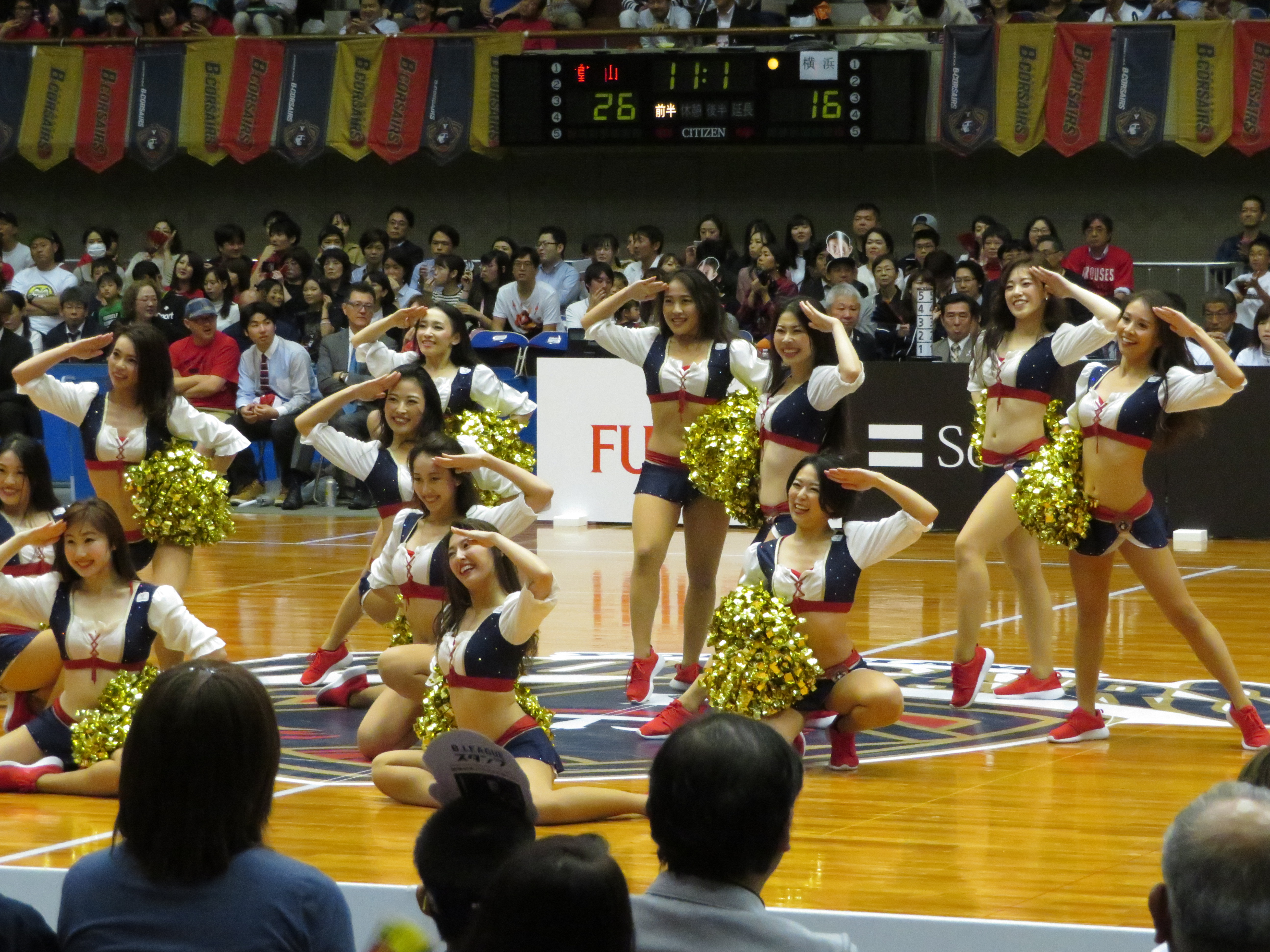 2018年10月18日撮影 2018-19 B1 第3節 横浜-富山 横浜文化体育館にて